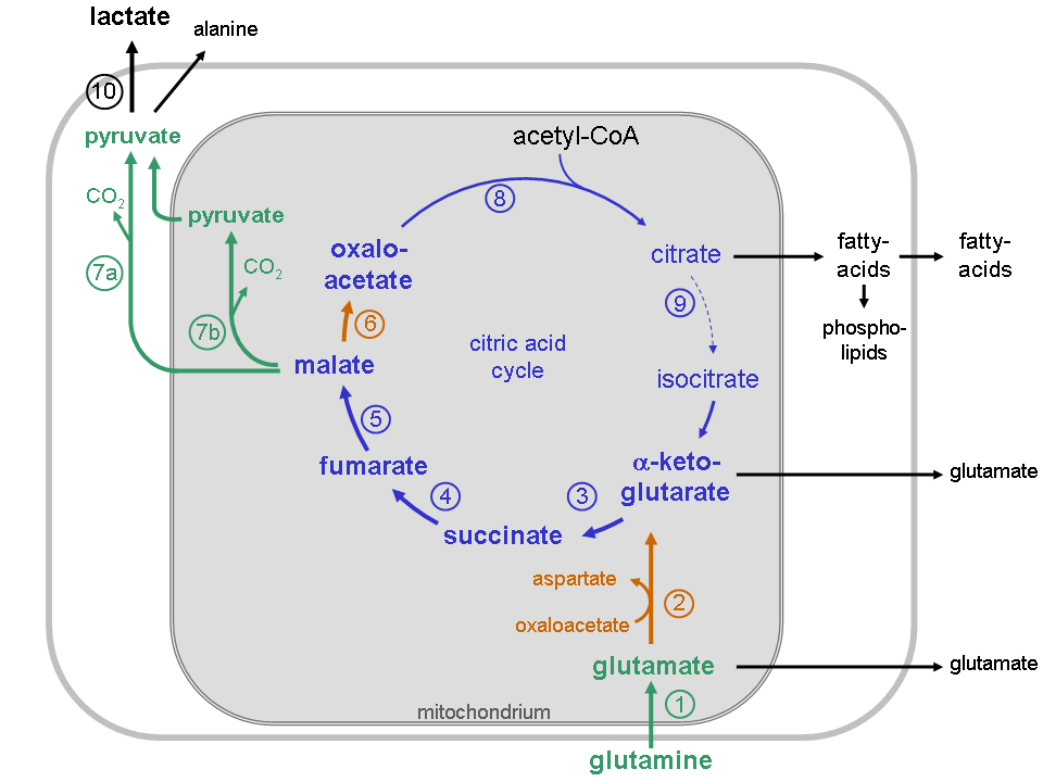 glutaminolysis